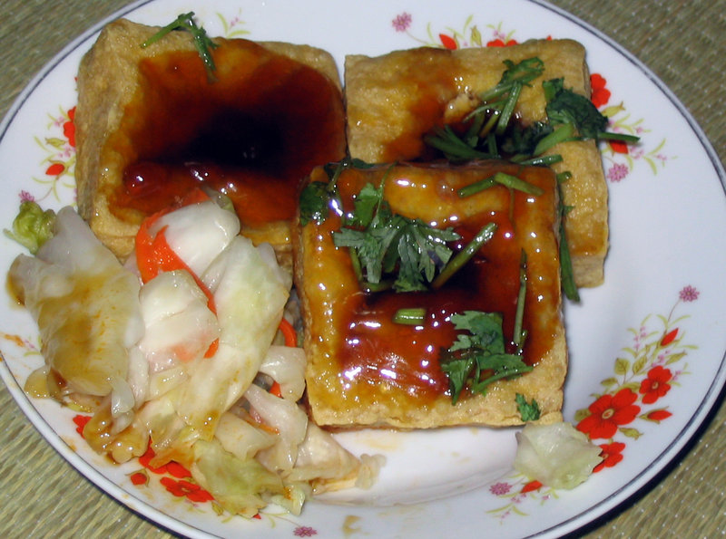 台北市南機場夜市買來的油炸臭豆腐。Canon A70拍攝。Richy 15:53 2004年8月18日 (UTC)